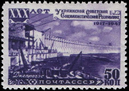 Почтовая марка СССР - Днепрогэс